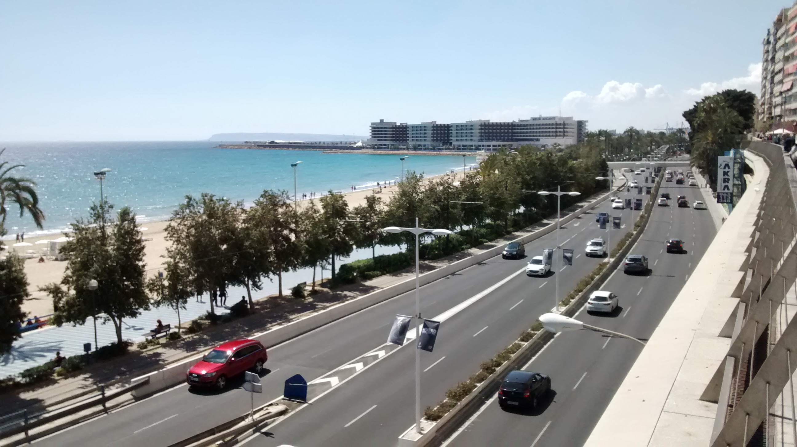 Calle de Jovellanos desde el Raval Roig